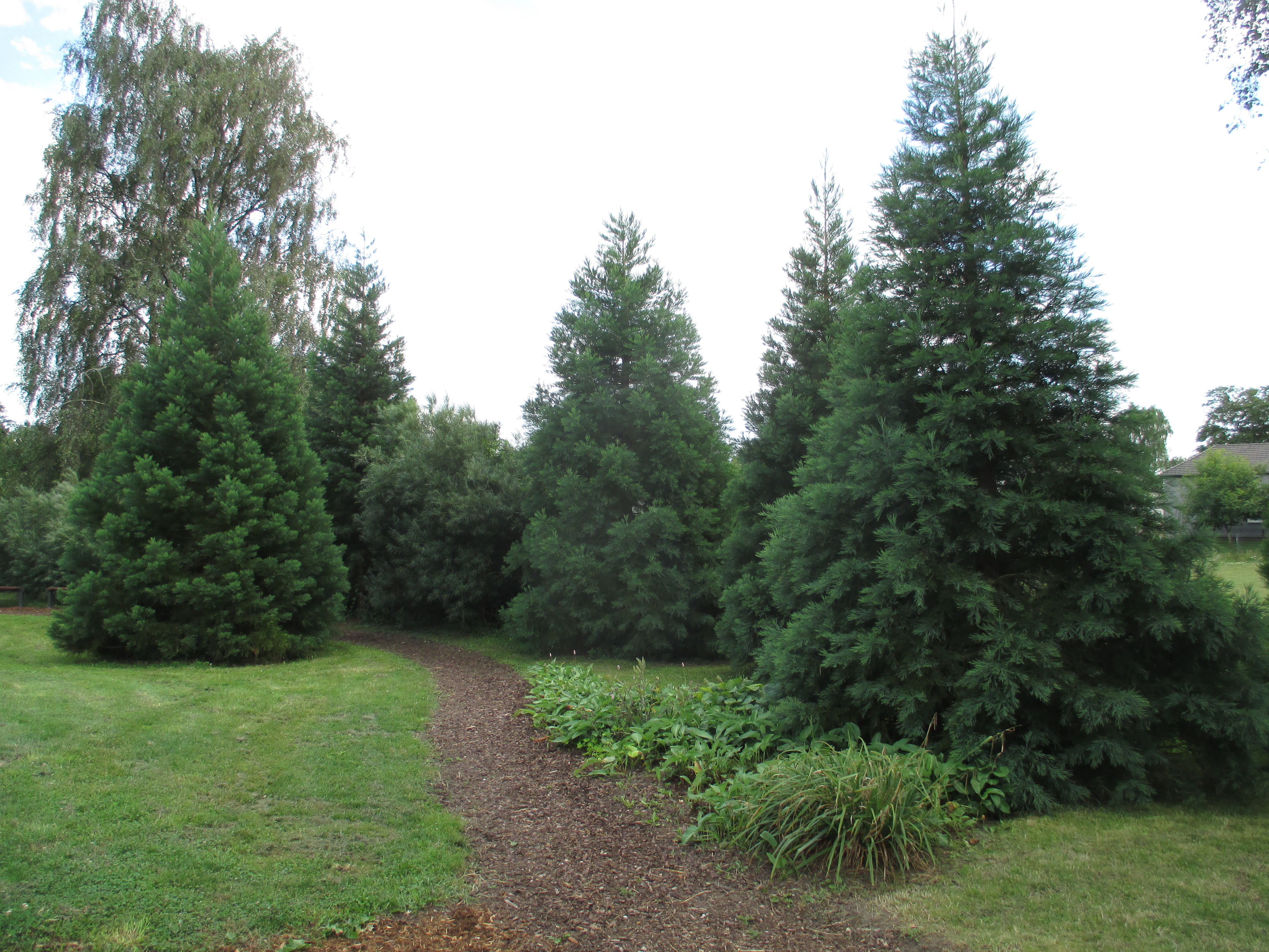 Mammutbaumwäldchen an der Großen Goorley.